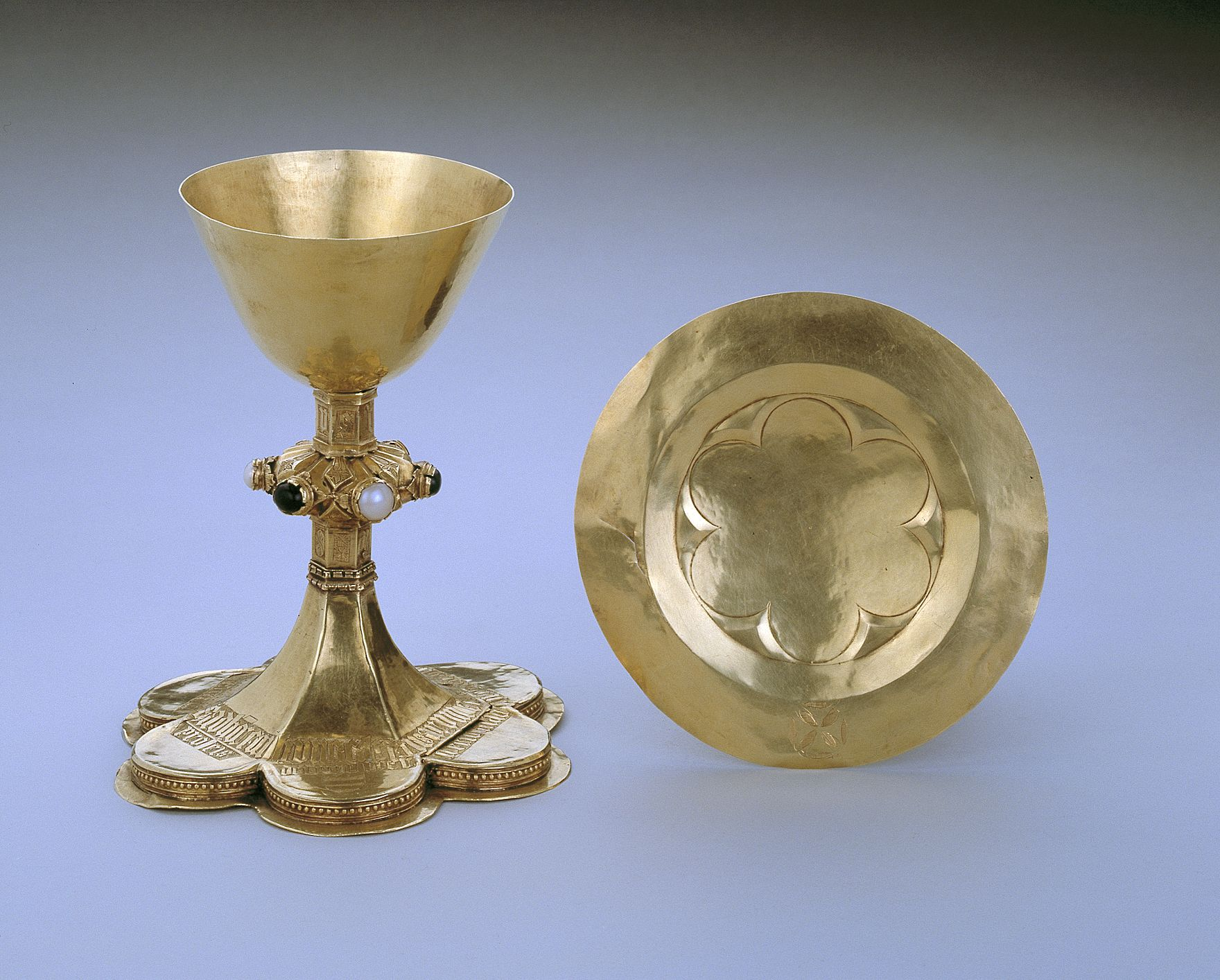 Alterkalk og disk af guld fra Araslöv Kirke i Skåne. Den latinske indskrift på foden oplyser "Denne kalk af guld har fru Christina til Araslöv ladet gøre til Guds ære for at afkøle sine kæres sjæle (dvs. lindre deres pine i Skærsilden) Datering: o. 1390